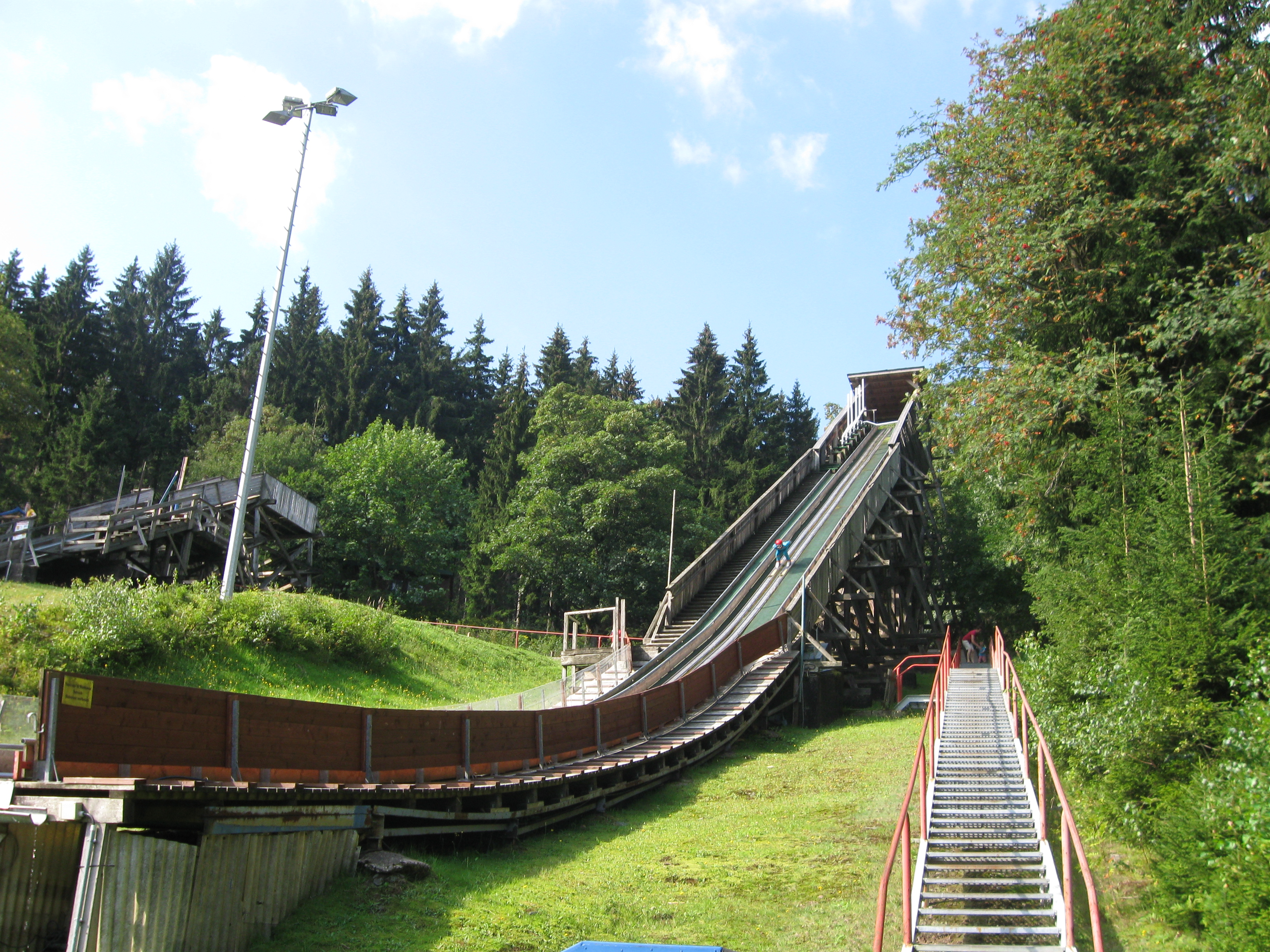 Schülerschanzen am Wadeberg, Oberhof